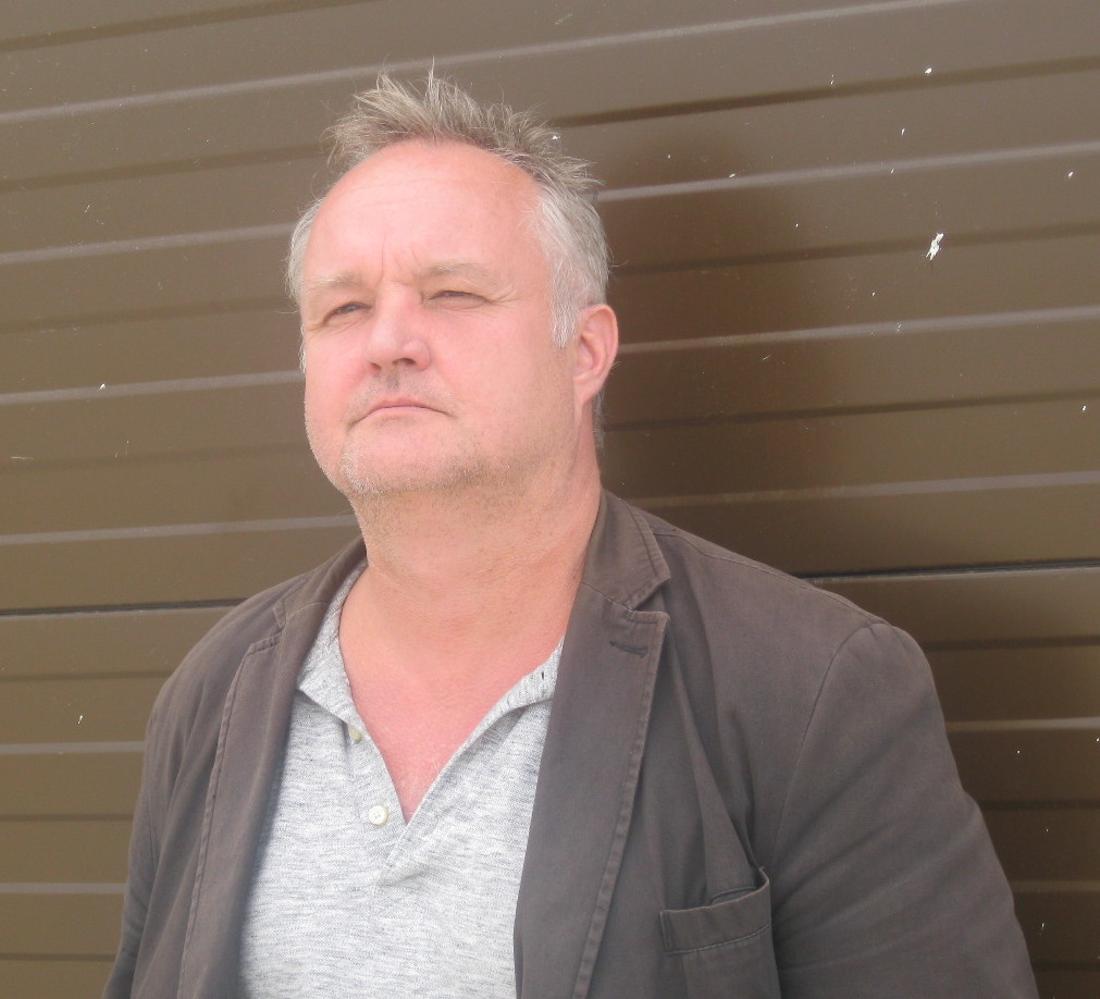 ©Judith Bader, 2013